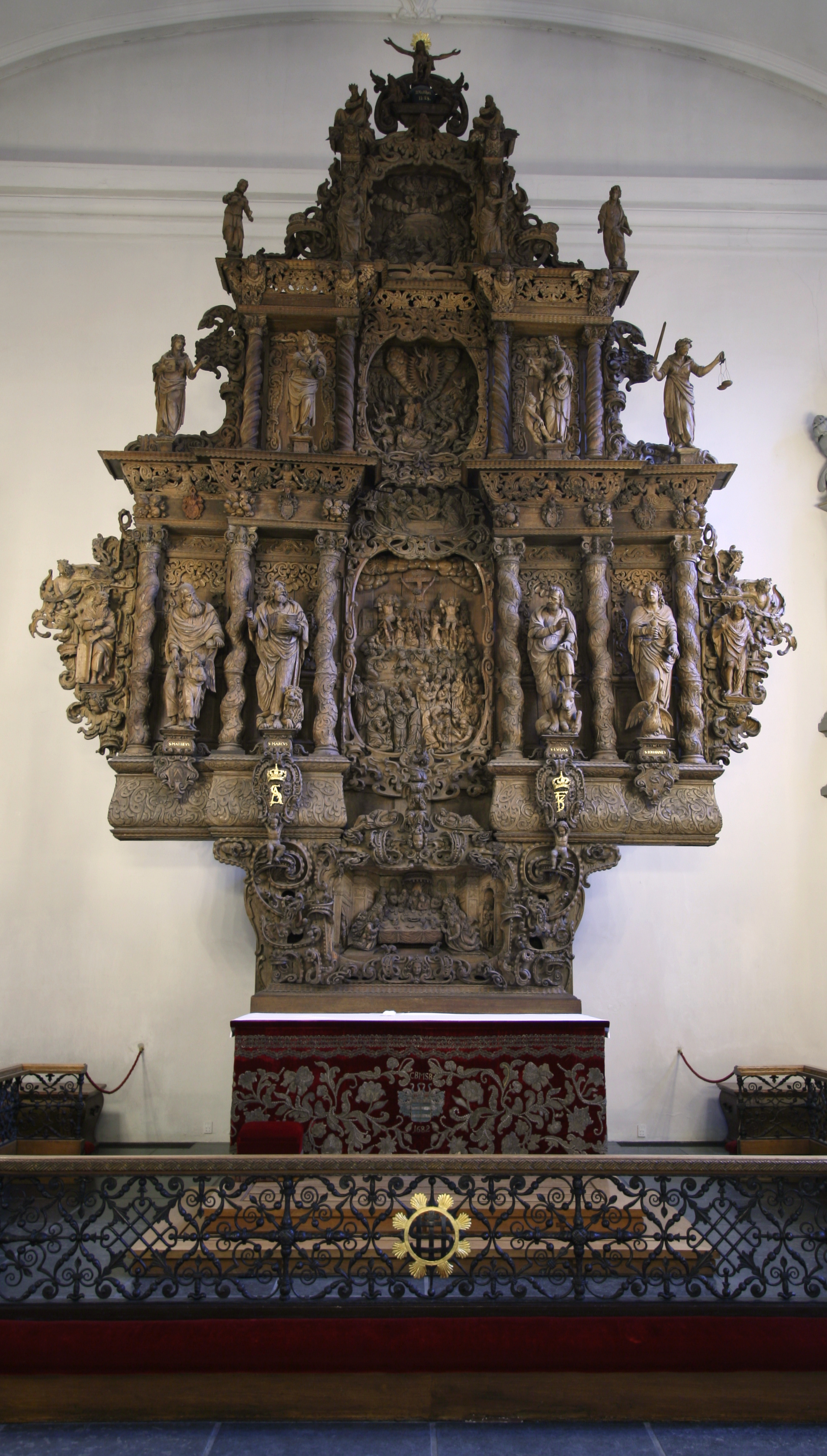 Holmens Kirke, Copenhagen, Denmark . Alteret.